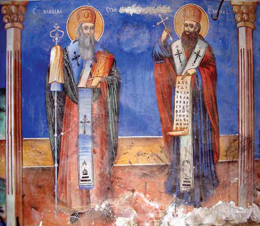 Бешиште, црква Св. Параскева, св. Кирил и св. Методија, северен ѕид